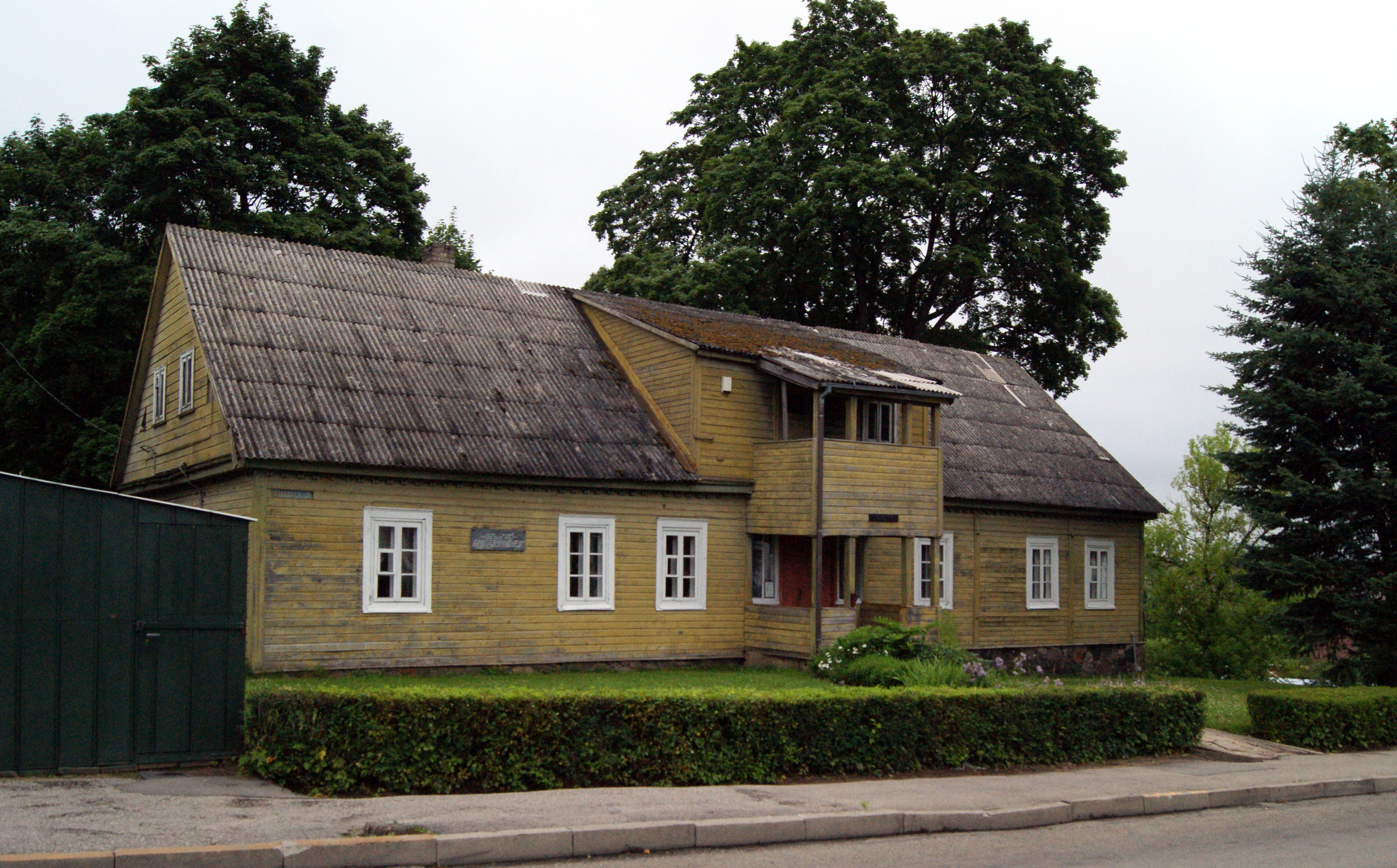 Stadtbibliothek von Tytuvenai, Litauen